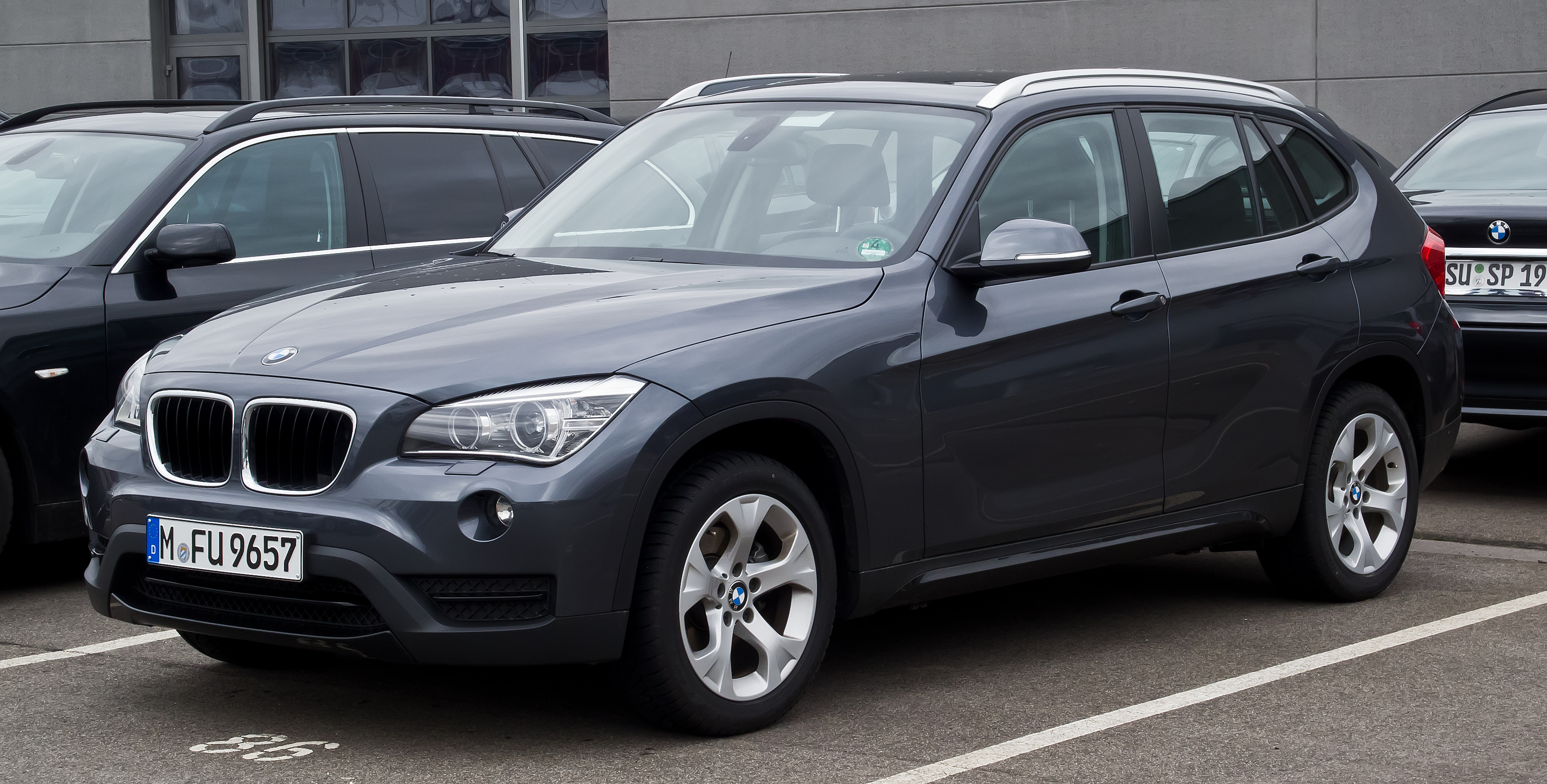 BMW X1 (E84, Facelift)